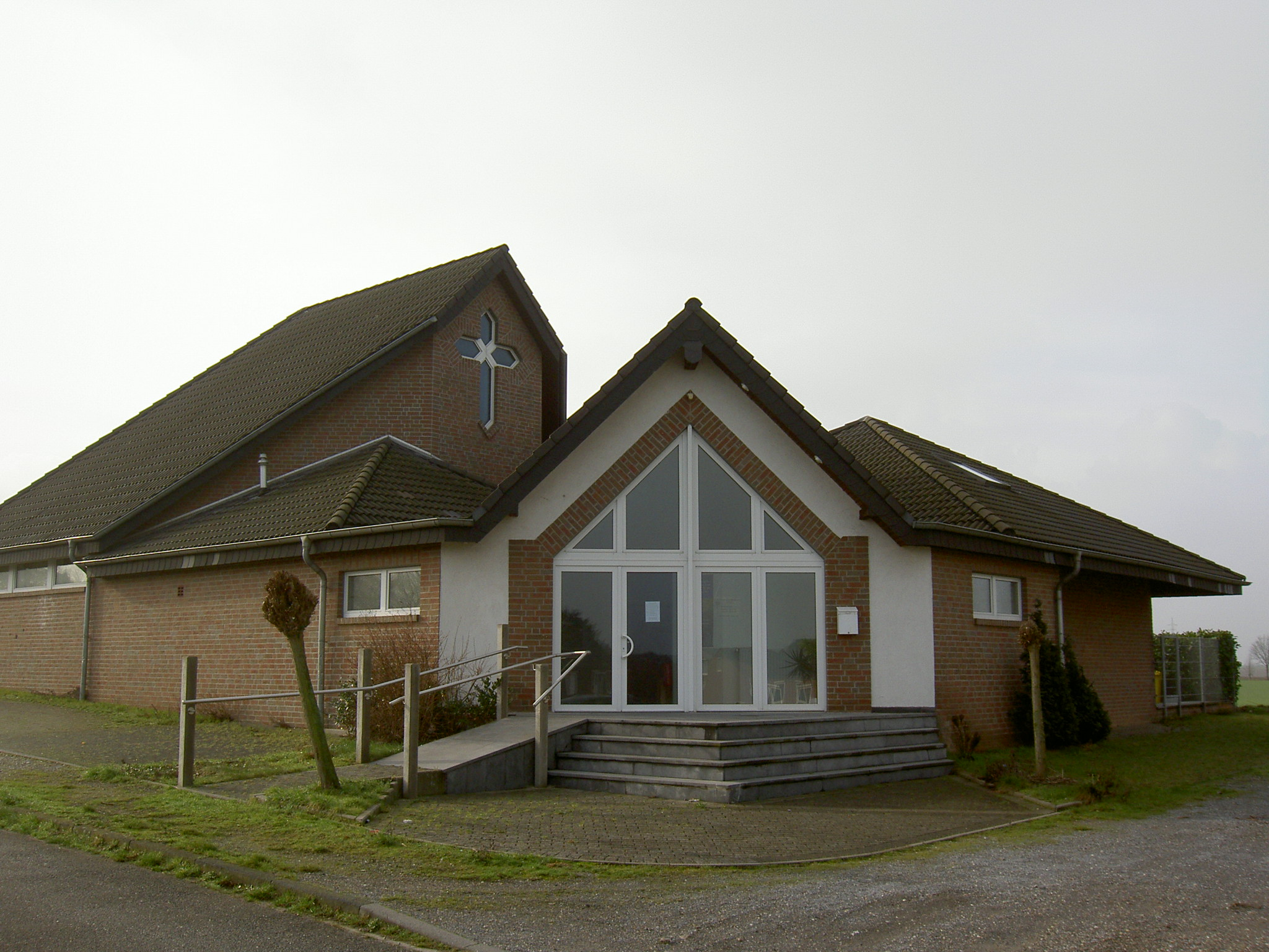 Kirche der Apostolischen Gemeinschaft, Uebach-Palenberg, Deutschland